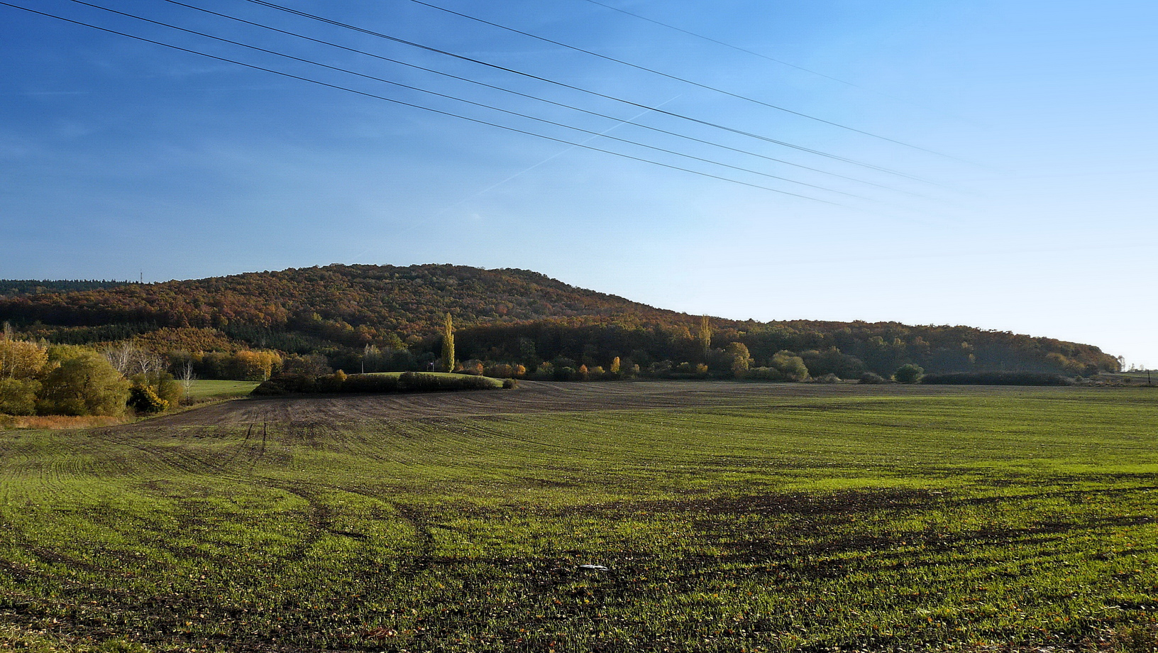 Pod Chlumem